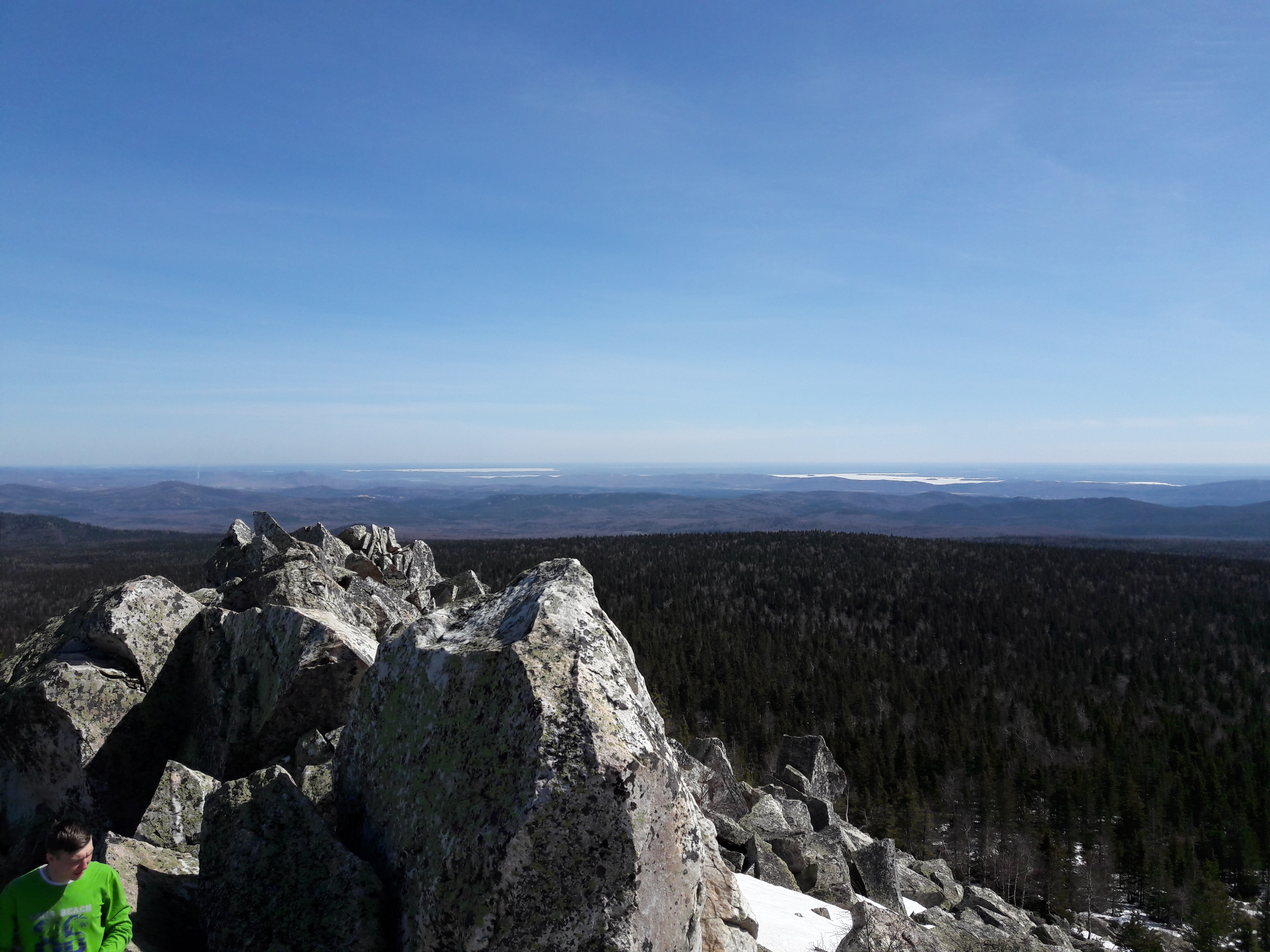 Вершина горы Ицыл: Златоуст, Челябинская область This image is related to the protected area of Russia number 7410094